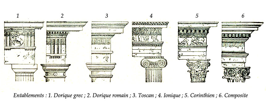 les différents styles d'entablement Source scannée depuis le Larousse 1922 par Nataraja-Shiva